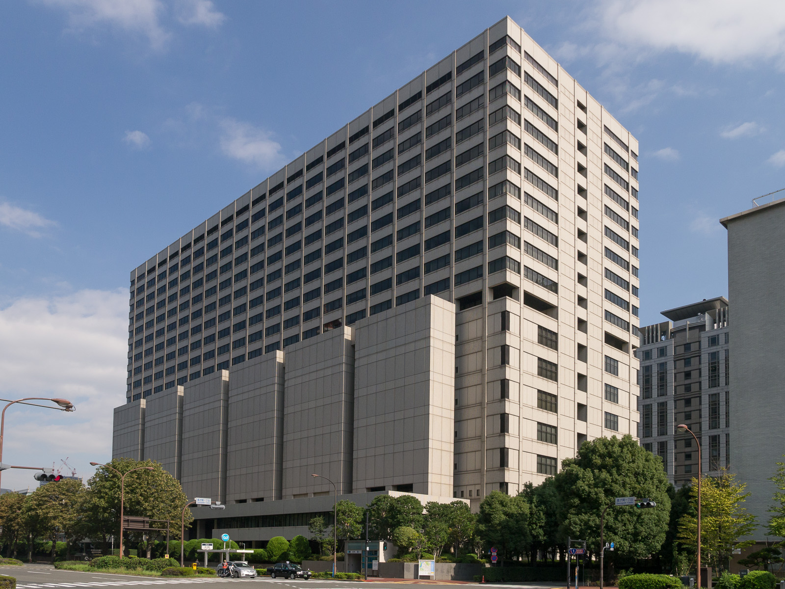 東京高等裁判所、東京都千代田区霞が関。